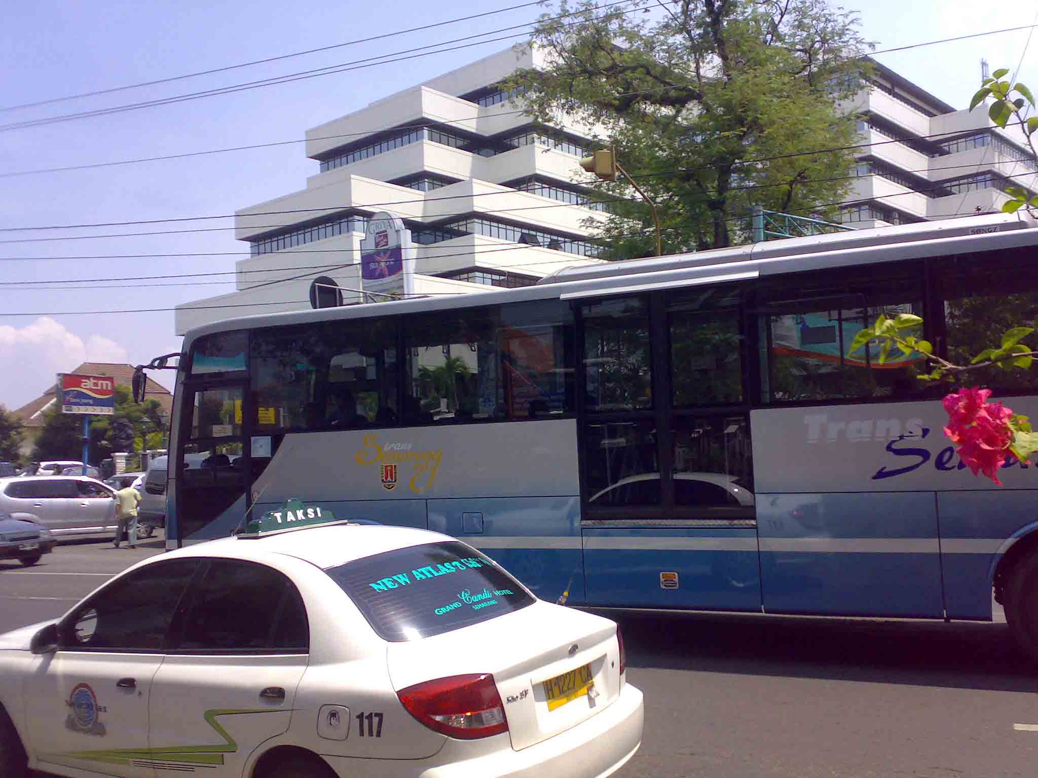 BRT saat melewati Jl. Pemuda, Semarang